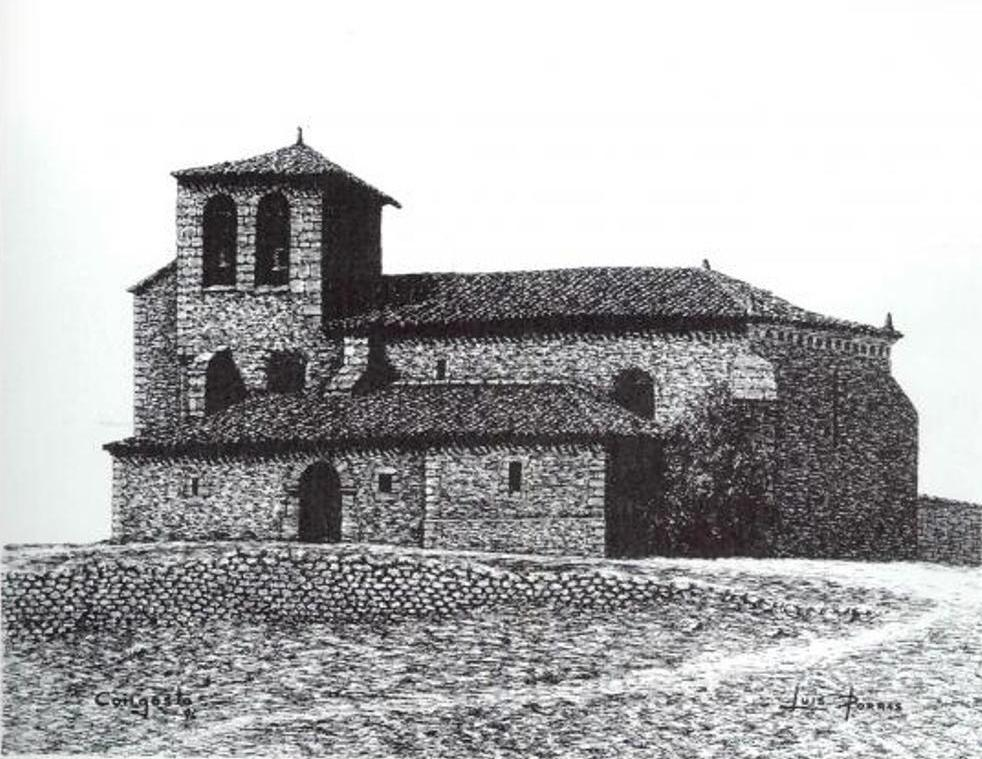 “así estaba y así deberá volver a estar”